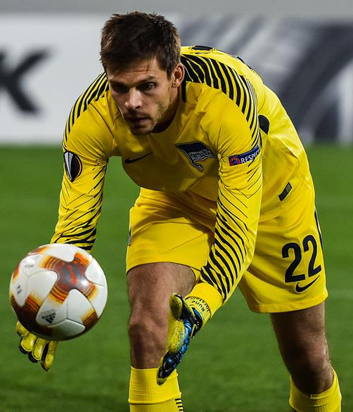 Заря - Герта 2:1